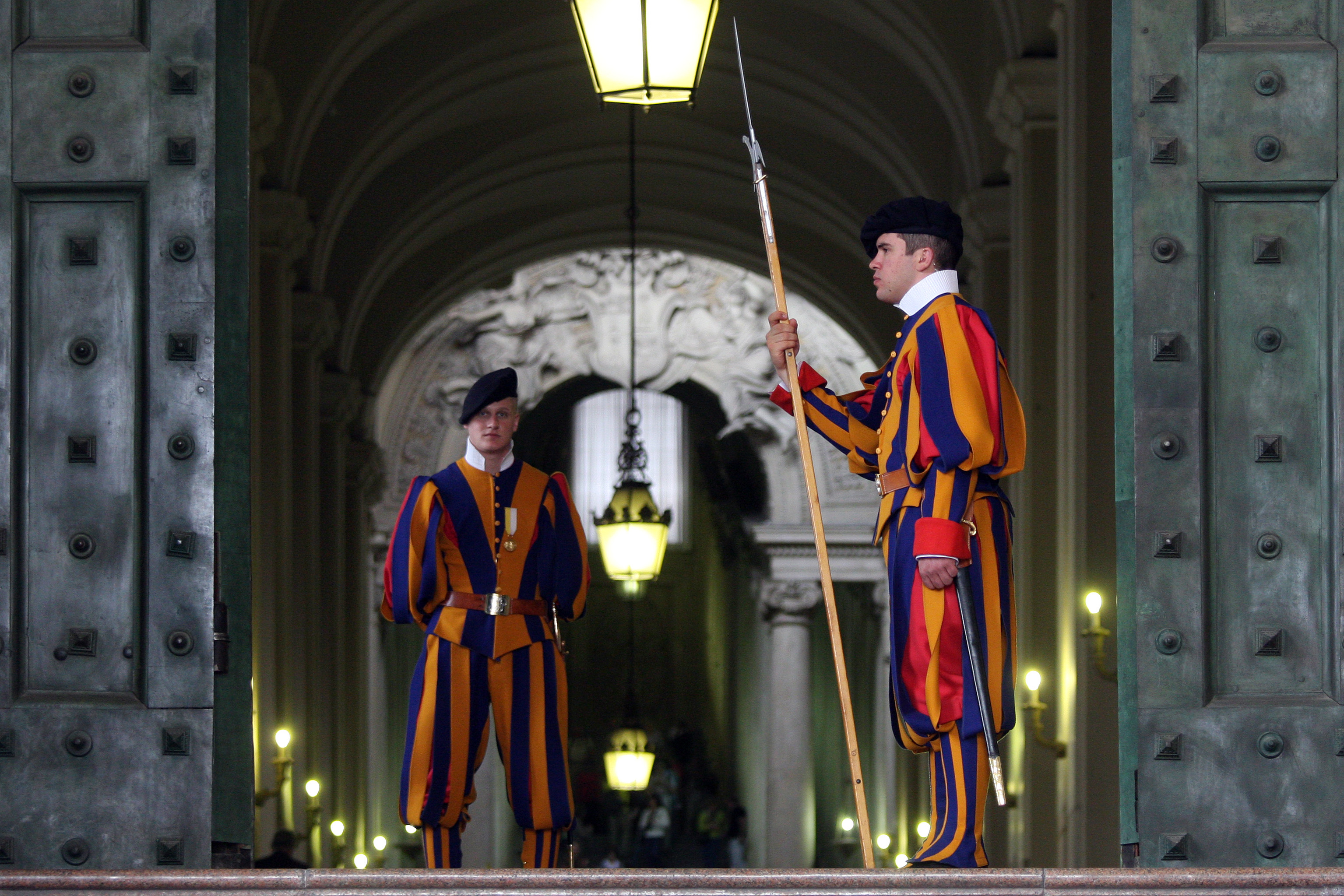 Città del Vaticano